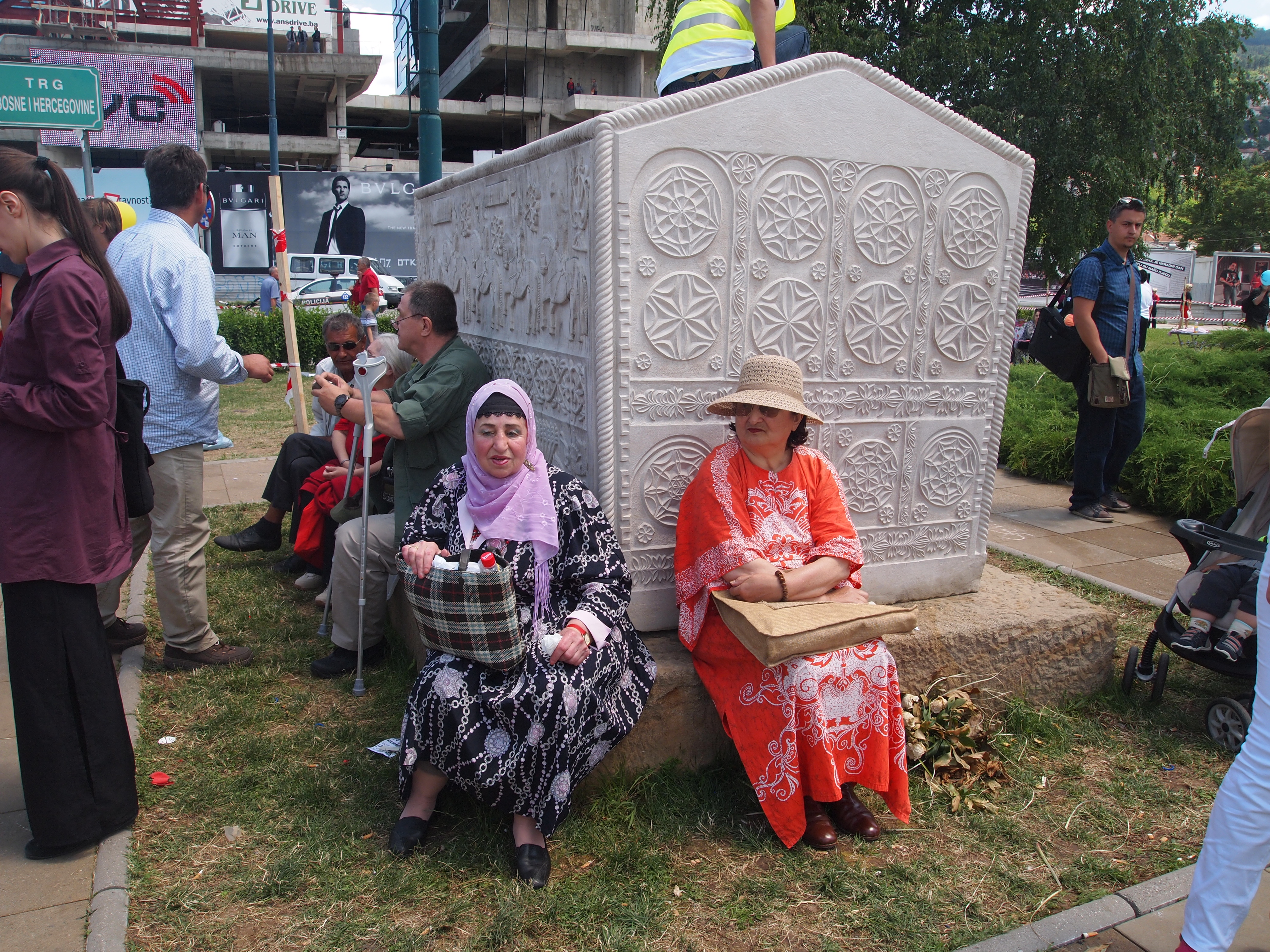 BLokada